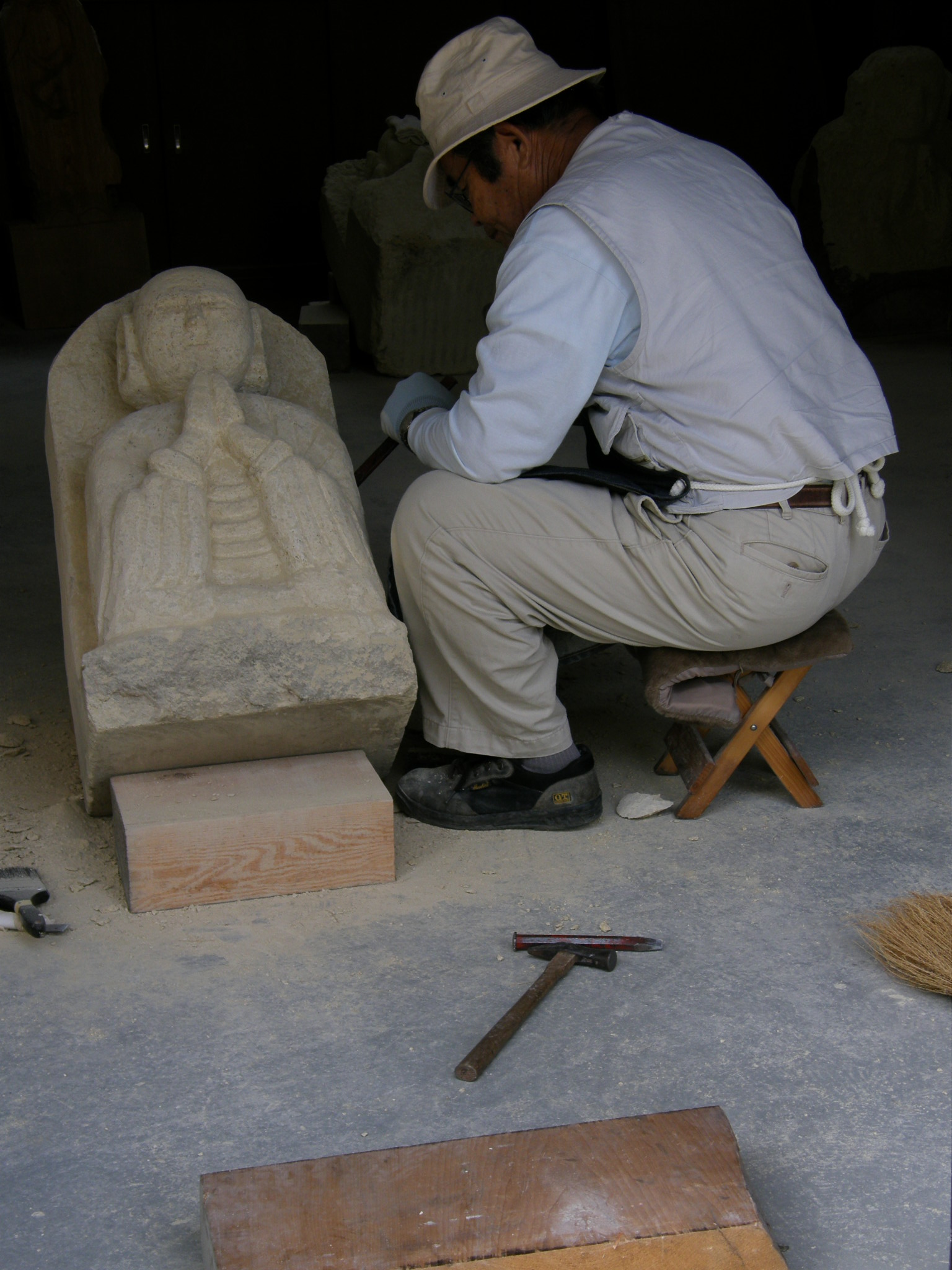 Kasai-Furubokke-nature park 古法華自然公園 加西市